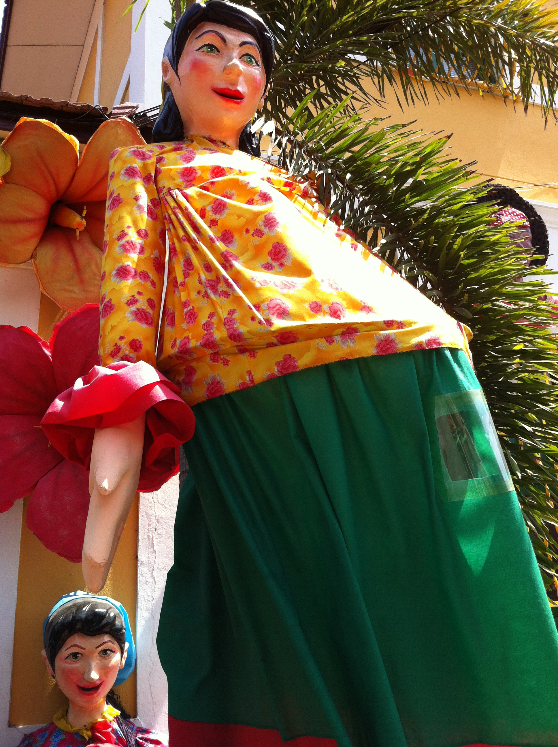 Muñecona - Carnaval de Barranquilla